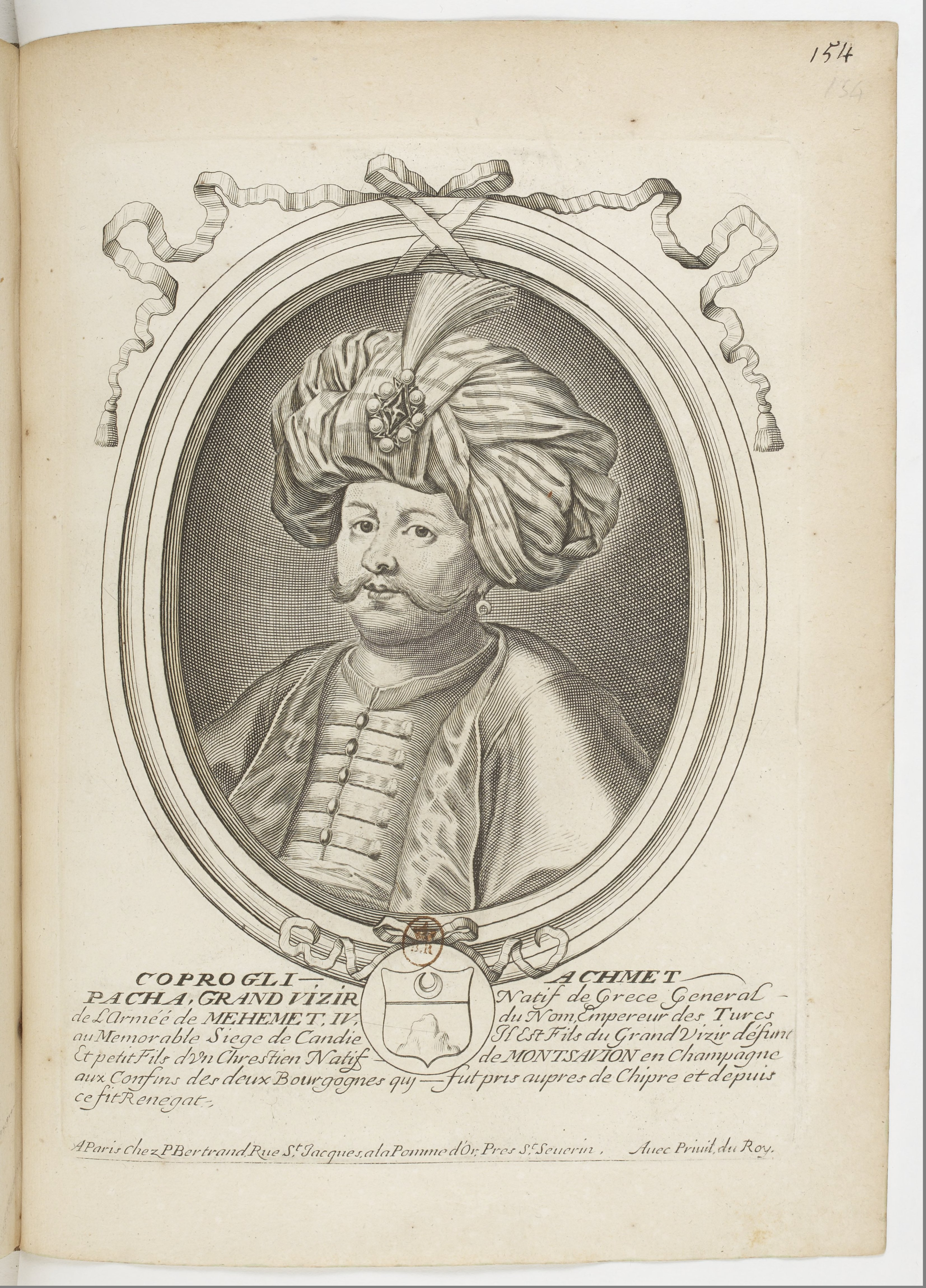 Les augustes représentations de tous les rois de France, depuis Pharamond jusqu'à Louis XIV,... avec un abrégé historique sous chacun, contenant leurs naissances, inclinations et actions plus remarquables pendant leurs règnes